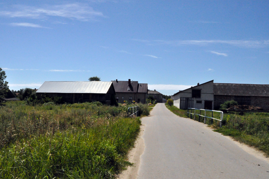 We wsi